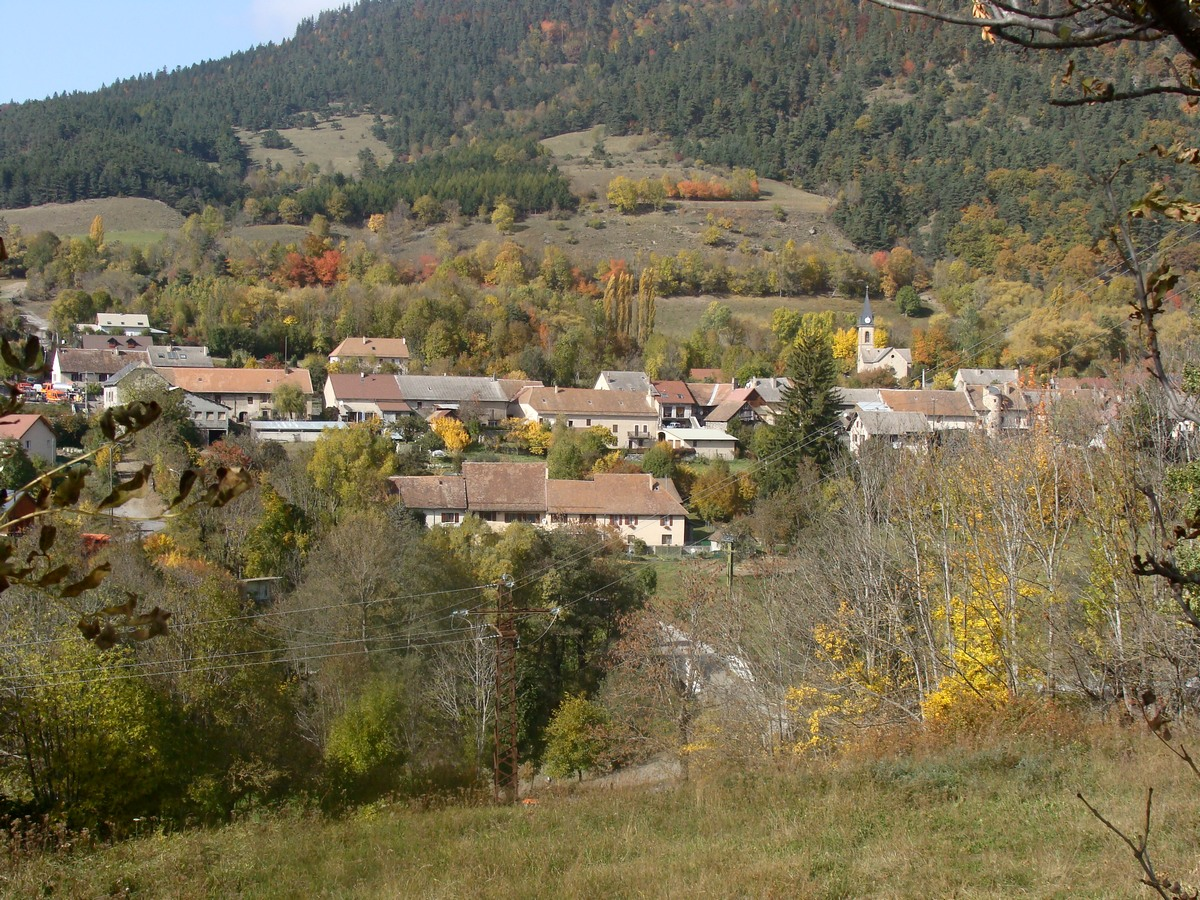 La Motte-en-Champsaur vu de la route des Infournas.